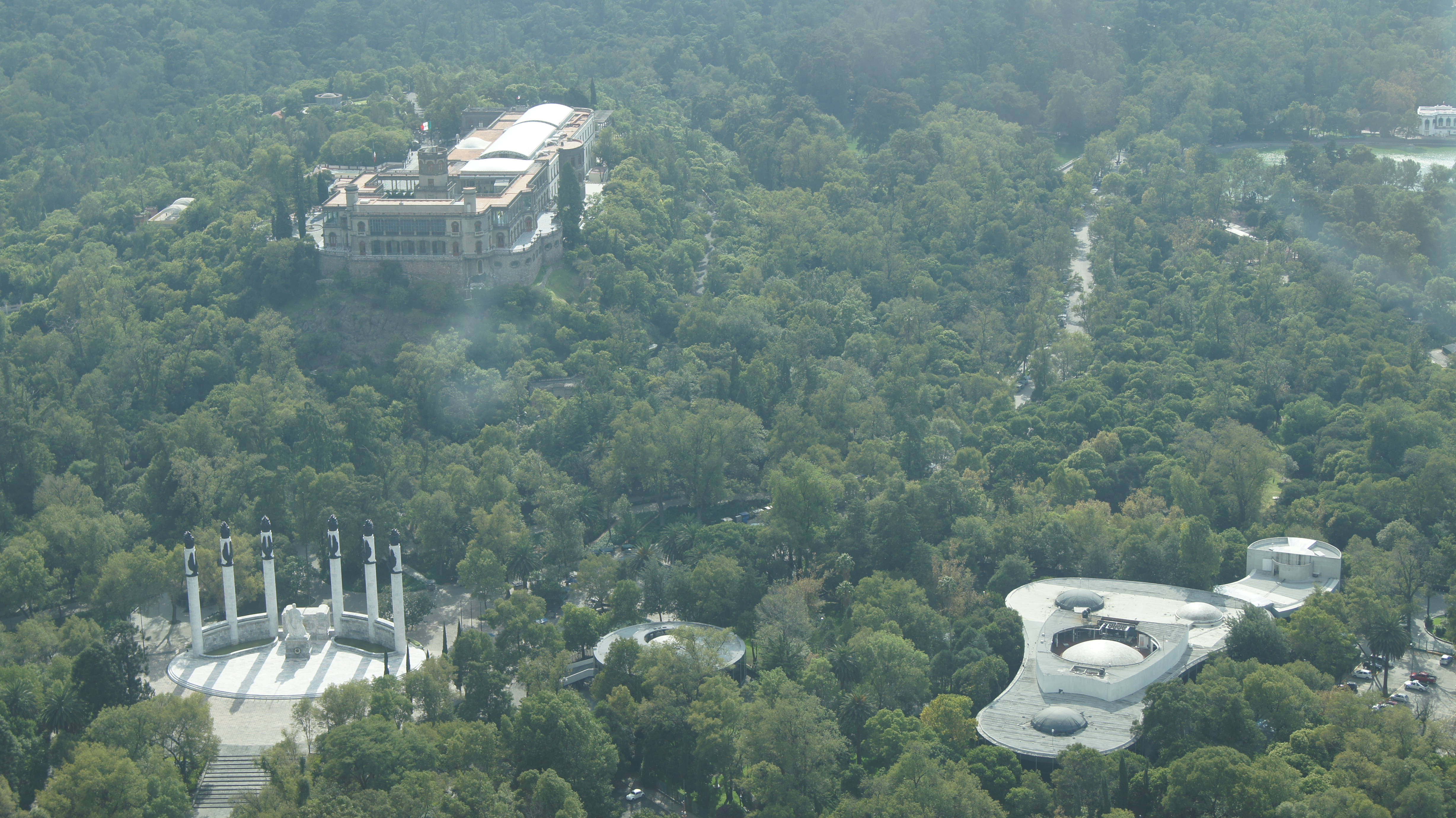 Vista del Chapultepec desde el Piso 51 del Torre Mayor